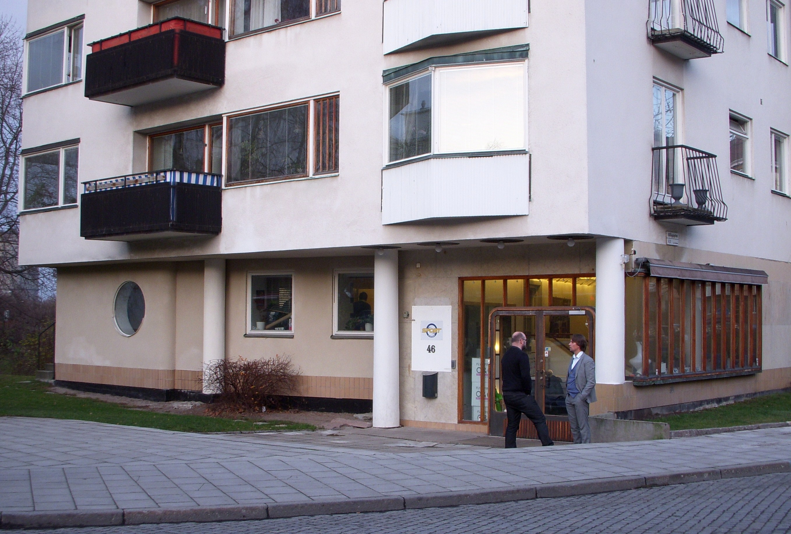 Biografen "Gärdet" på Östermalm i Stockholm